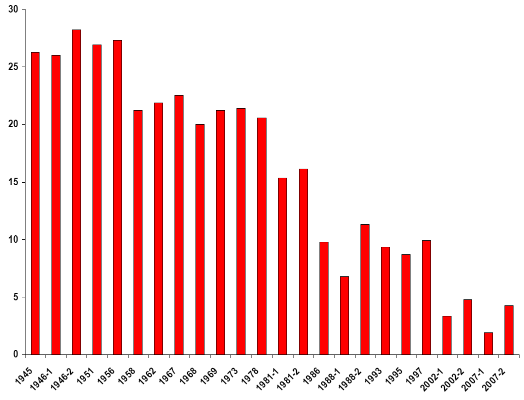 Graphique représentant l'évolution des votes en faveur des candidats du PCF aux élections législatives et présidentielles françaises entre 1945 et 2007.